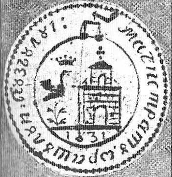 Coat of arms of Buzău, Romania, circa 1831